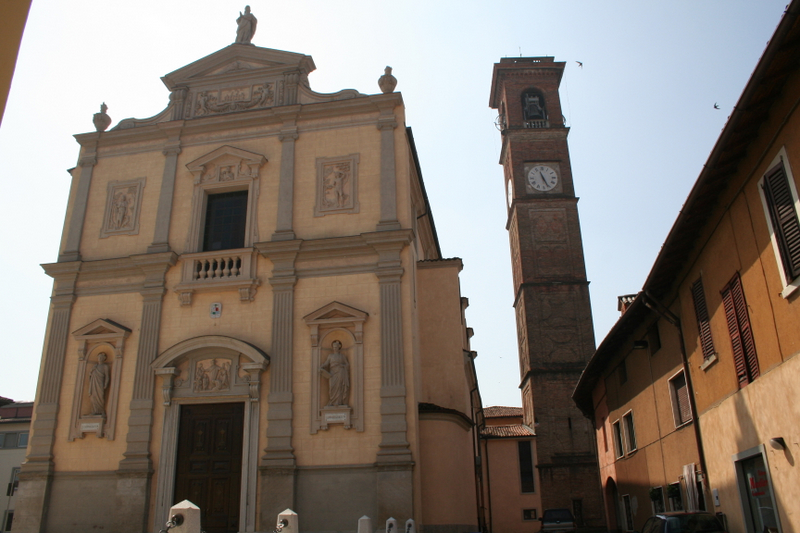 Spirano, la chiesa parrocchiale di San Gervasio e Protasio.